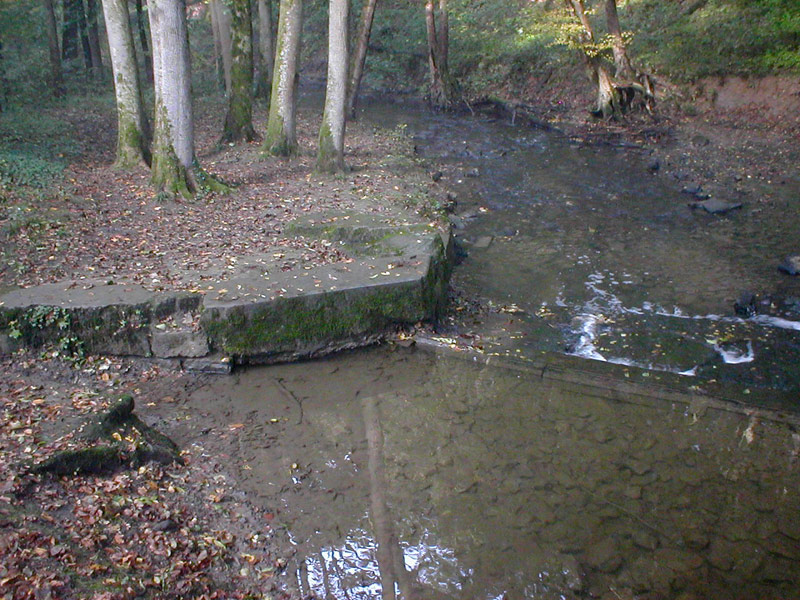 Abzweig eines Mühlkanals vom Mühlbach im Fünfmühlental bei Bad Rappenau, Baden-Württemberg, Deutschland